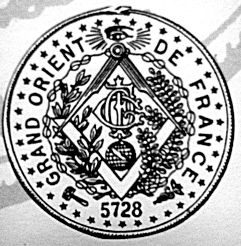 Sceau du Grand Orient de France.